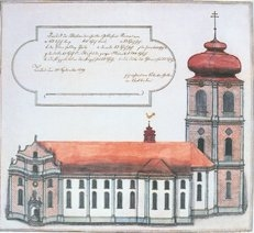 Alte Klosterkirche Mehrerau, Zustand 1790